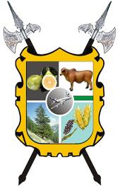 Es el escudo de armas del Municipio de Guémez tamaulipas, y solo es para proyecto de trabajo, al no encontra uno real